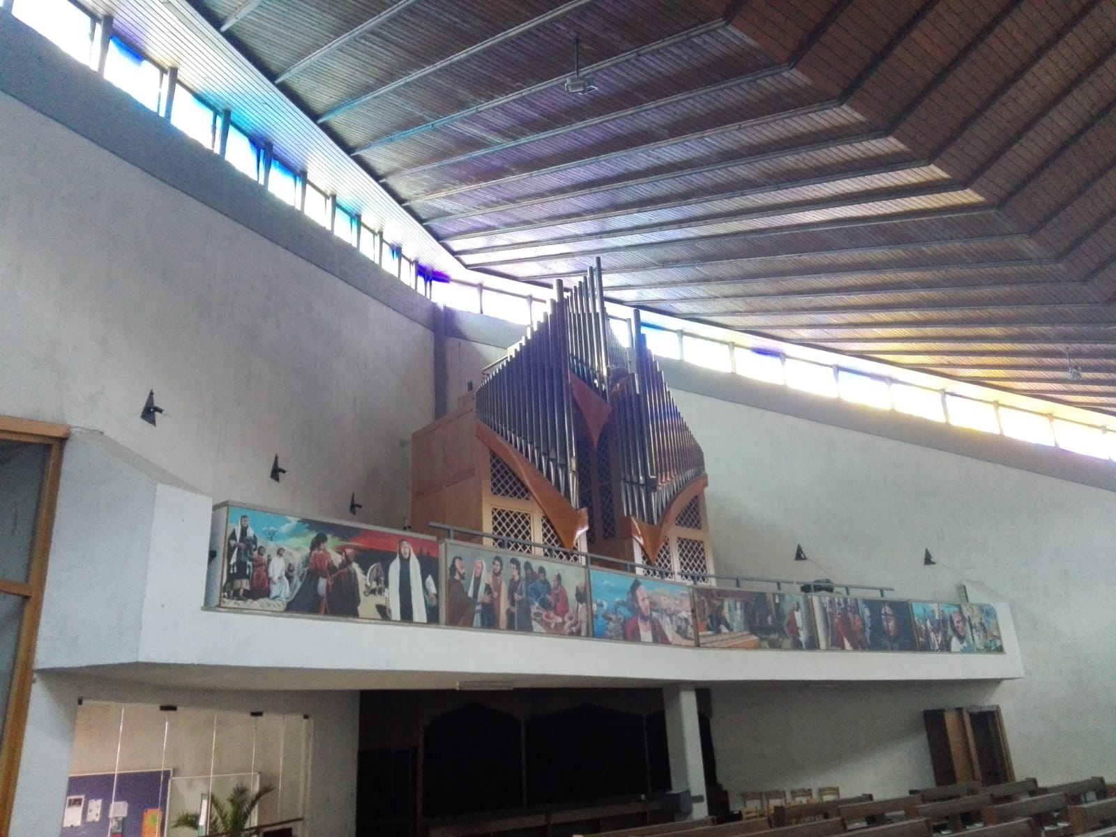 Organo e cantori della chiesa di san paolo